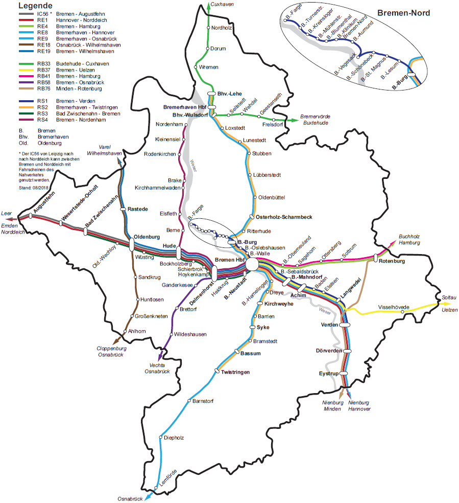 Übersichtsplan aller VBN-Linien mit Haltepunkten sowie des VBN-Gebietes.